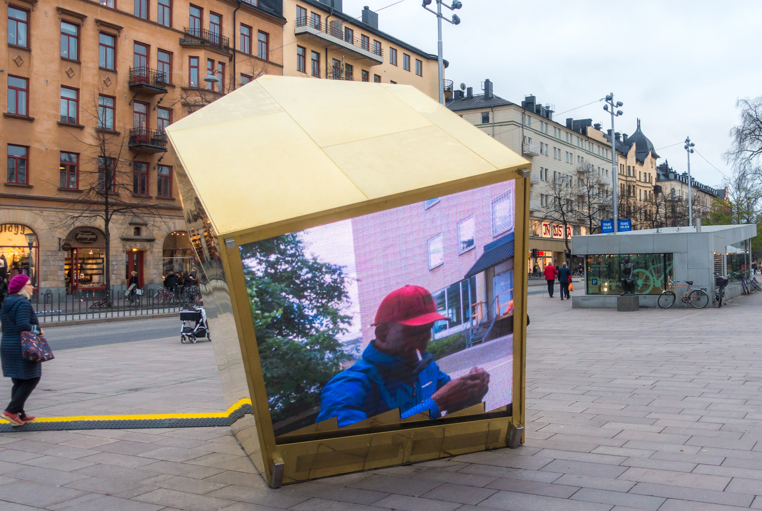 Filmskulpturen Huset 2018, tillfälligt uppställd på Odenplan i Stockholm under november 2018. Filmskulptur skildrar hemlöshet i en dokumentär. Verket startar sin resa i Stockholm men ska sedan vidare till andra städer. Filmskulpturen Huset är gjord av konstnärerna Erik Pauser och Cecilia Parsberg och arkitekterna Haval Murad och David Martinez Escobar och ska spegla sprickor i det moderna samhället.